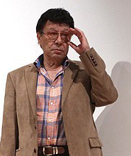 حسین عرفانی مراسم تجلیل از چهار دوبلور پیشکسوت صدا و سیما ۱۳۹۲/۴/۸